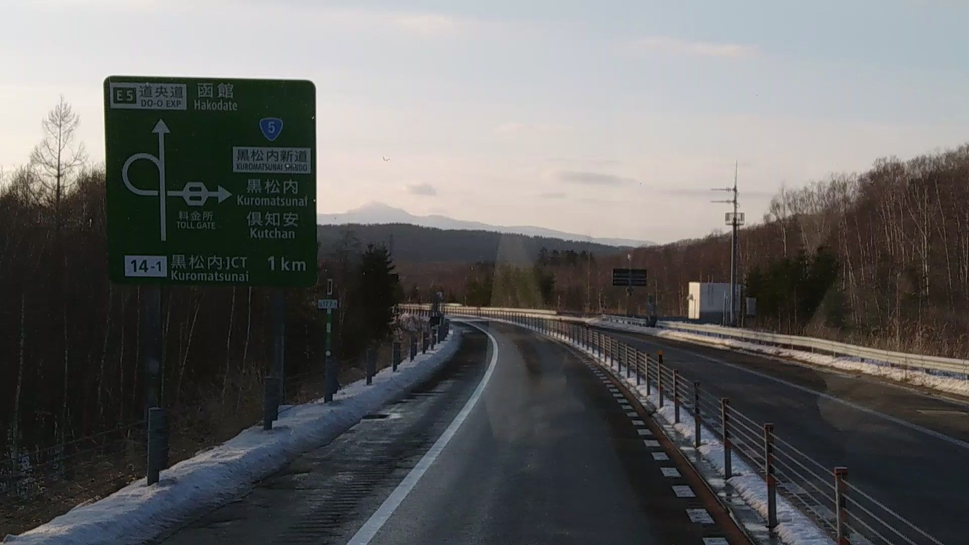 黒松内ジャンクション・方面と方向の予告（1km先、札幌側から、2018年12月撮影）ジャンクションの形状と料金所の位置が分かりやすい表示となっている